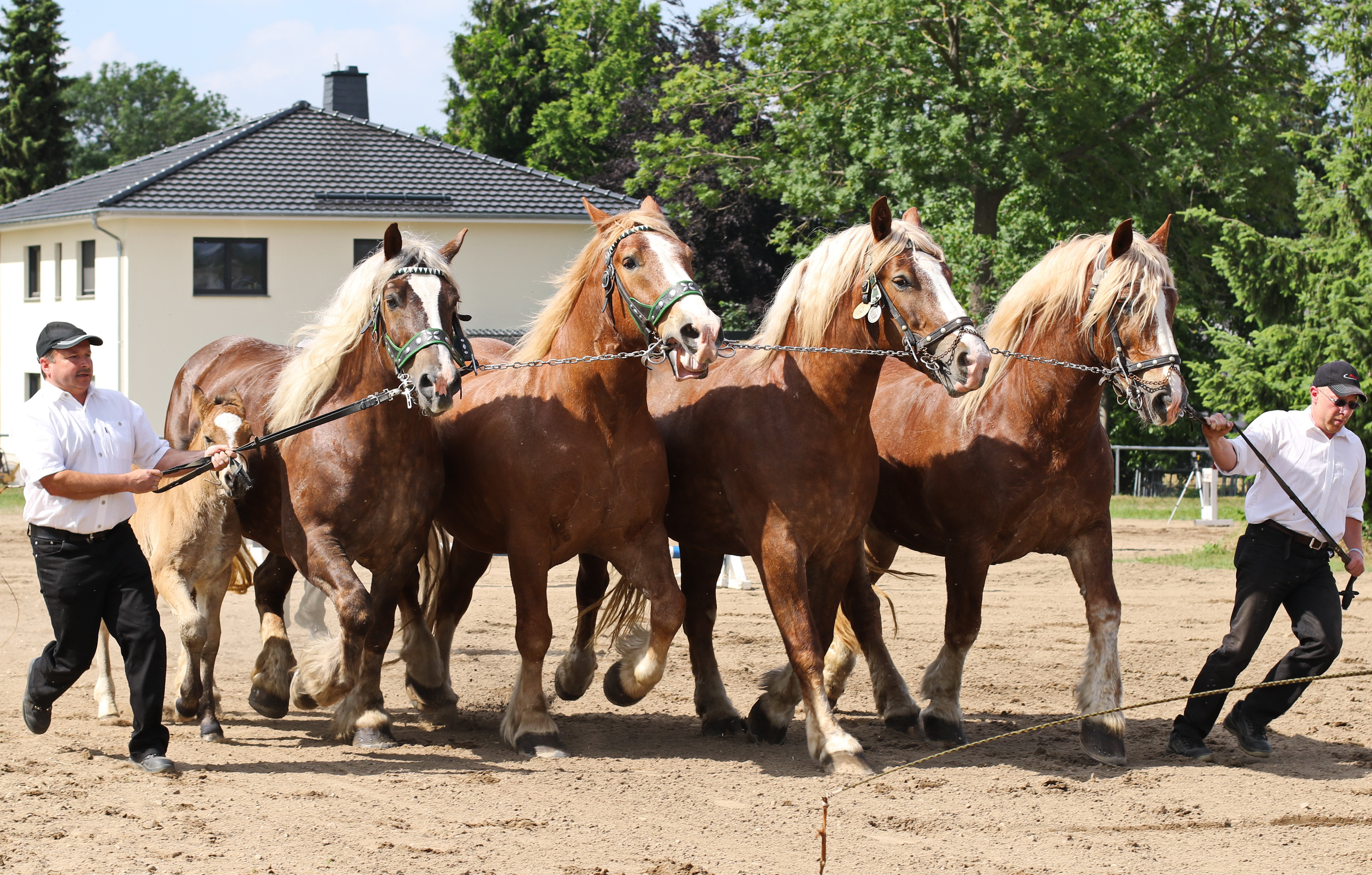 Pferdesportveranstaltung in Seifersdorf (Jahnsdorf) im Erzgebirge. Sachsen.